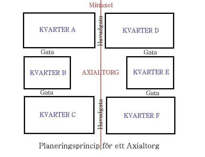 Illustrationsprincip för ett "axialtorg"